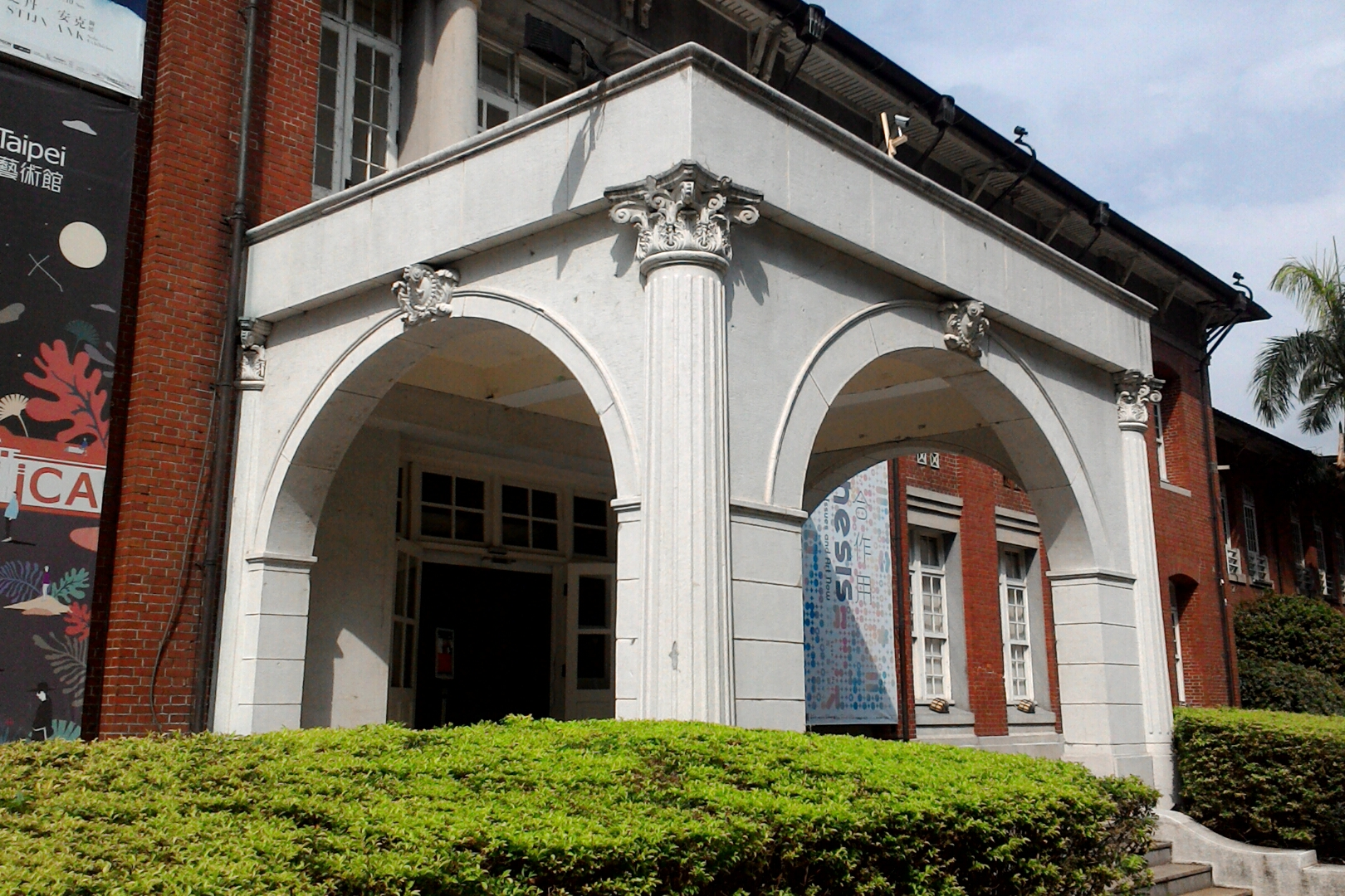 台北市政府舊廈門廊,台北市大同區建成次分區建泰里